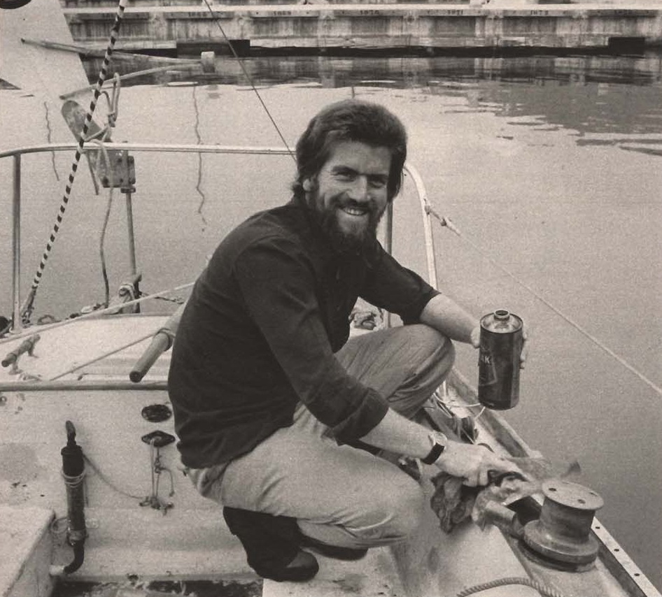 Italian sailor Erik Pascoli in his sailboat